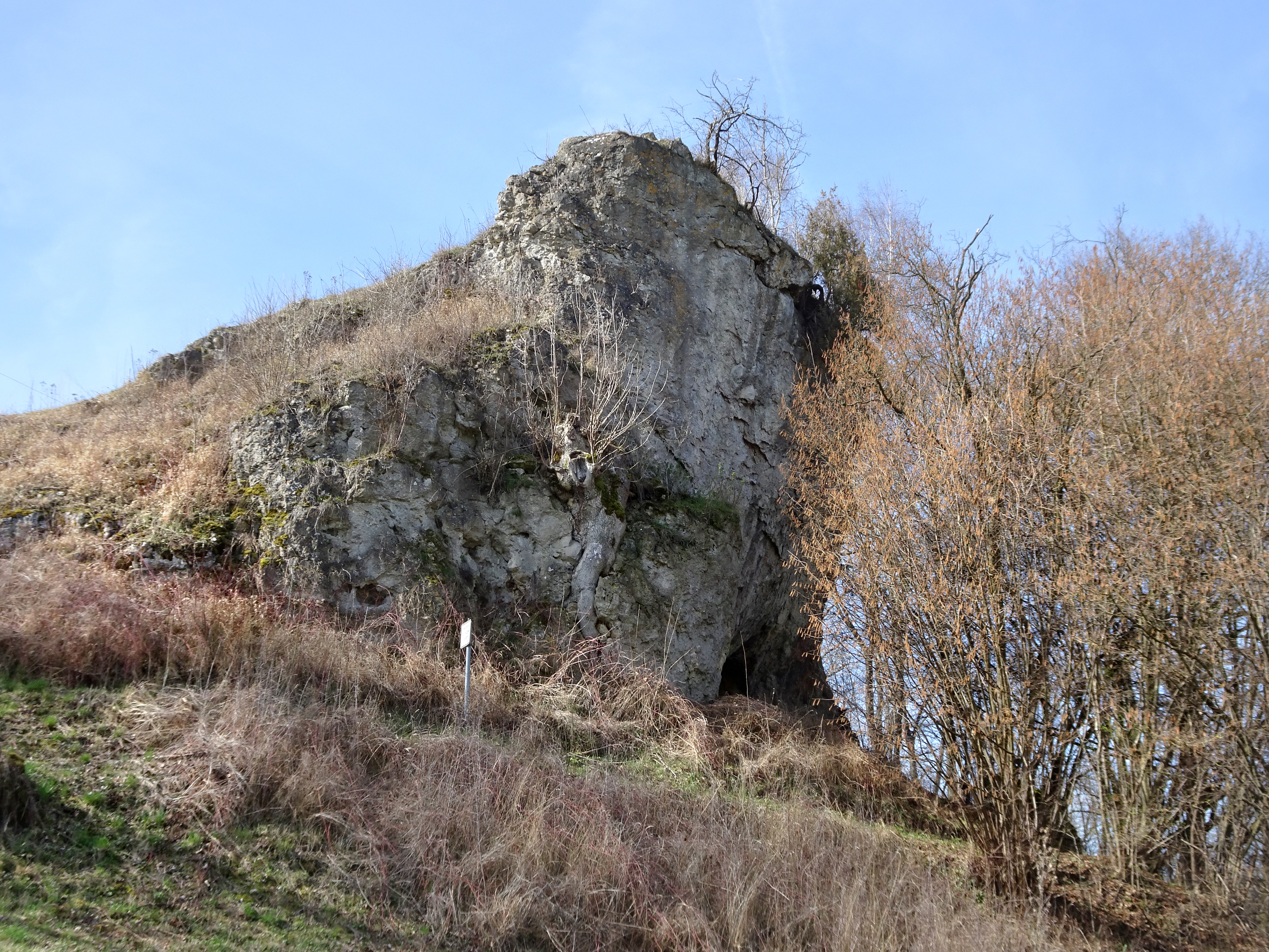 Der Mühlstein bei Wolfterode ist ein Felsen der aus dem Dolomit des oberen Zechsteins besteht. Er reiht sich ein in eine Anzahl alleinstehender Felsformationen, die aus dem Karstgebiet des östlichen Meißnervorlands ragen und die die Landschaft prägen. Wegen seiner besonderen geologischen und vegetationskundlichen Bedeutung wurde er bereits im Jahr 1936 als Naturdenkmal ausgewiesen. Der Mühlstein liegt östlich von Wolfterode, einem Ortsteil der Gemeinde Meißner im nordhessischen Werra-Meißner-Kreis.